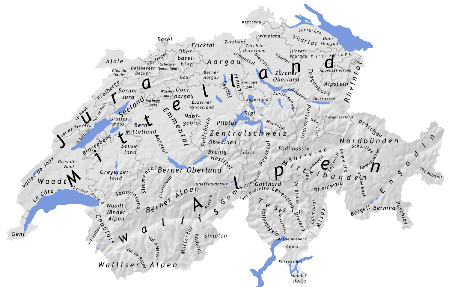 Karte der Regionen der Schweiz / map of regions of Switzerland